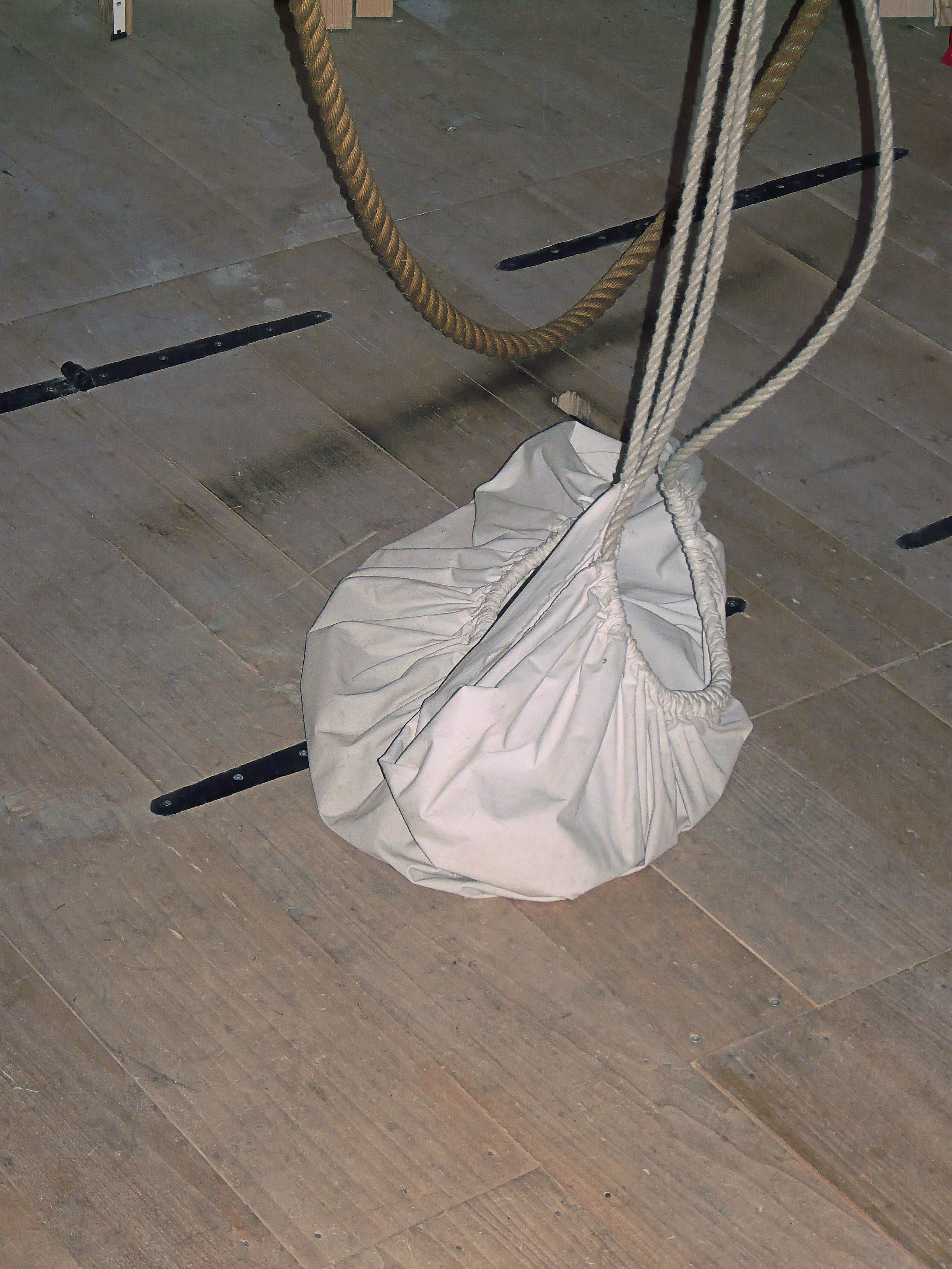 Molen De Kroon Arnhem luimat